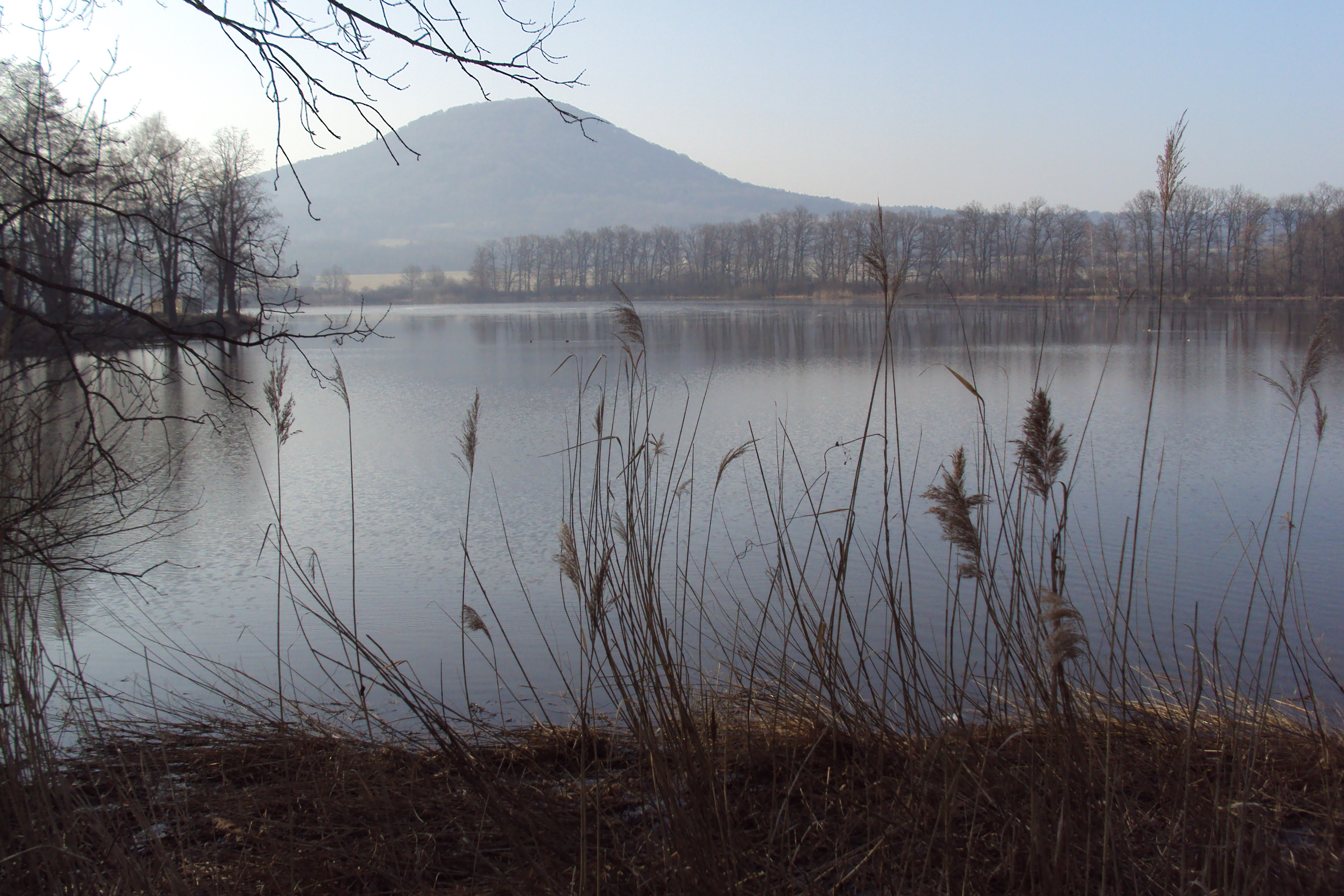 Dolanský rybník na jihu Českolipska, katastr obce Stvolínky, vzadu kopec Vlhošť